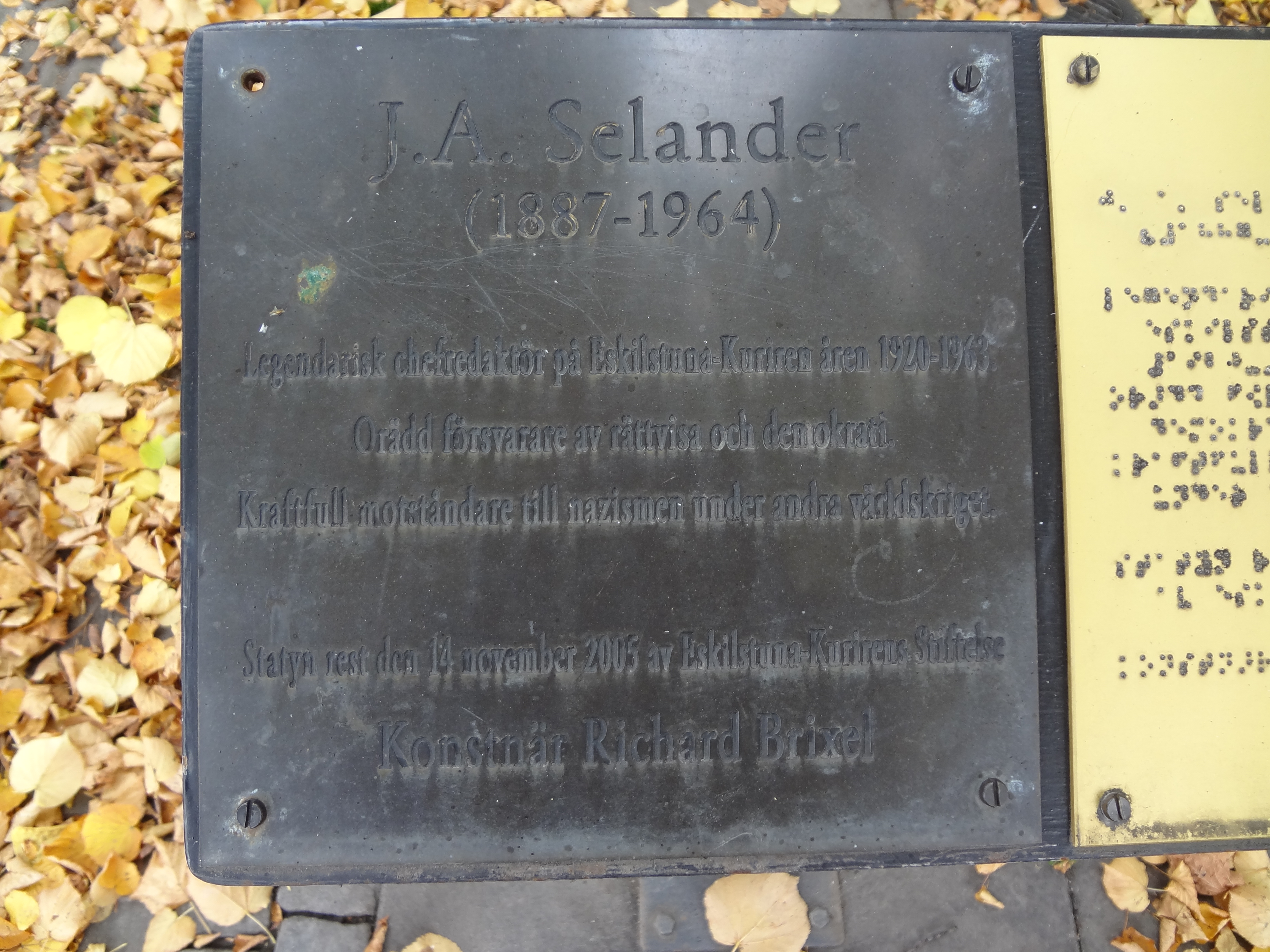 En skylt vid J A Selanders gata, bredvid en staty av honom.